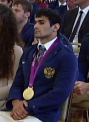 Встреча победителей и призёров Олимпийских игр 2012 года с президентом России на вручении государственных наград 16 августа 2012